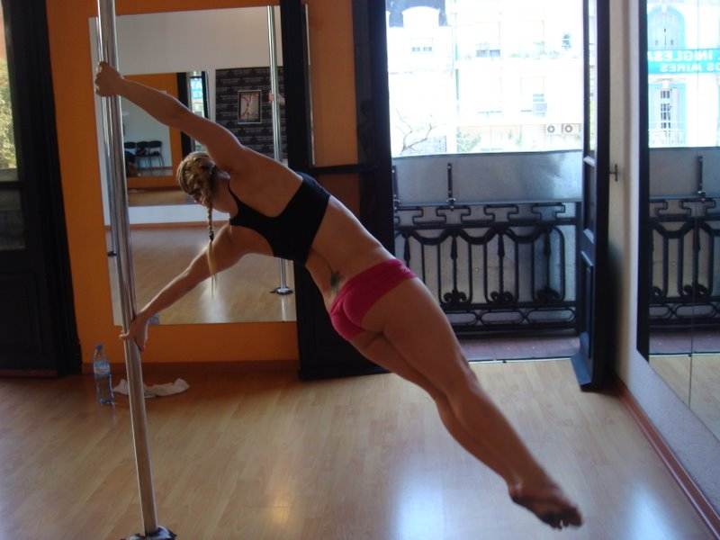 Pole dance na barra vertical.